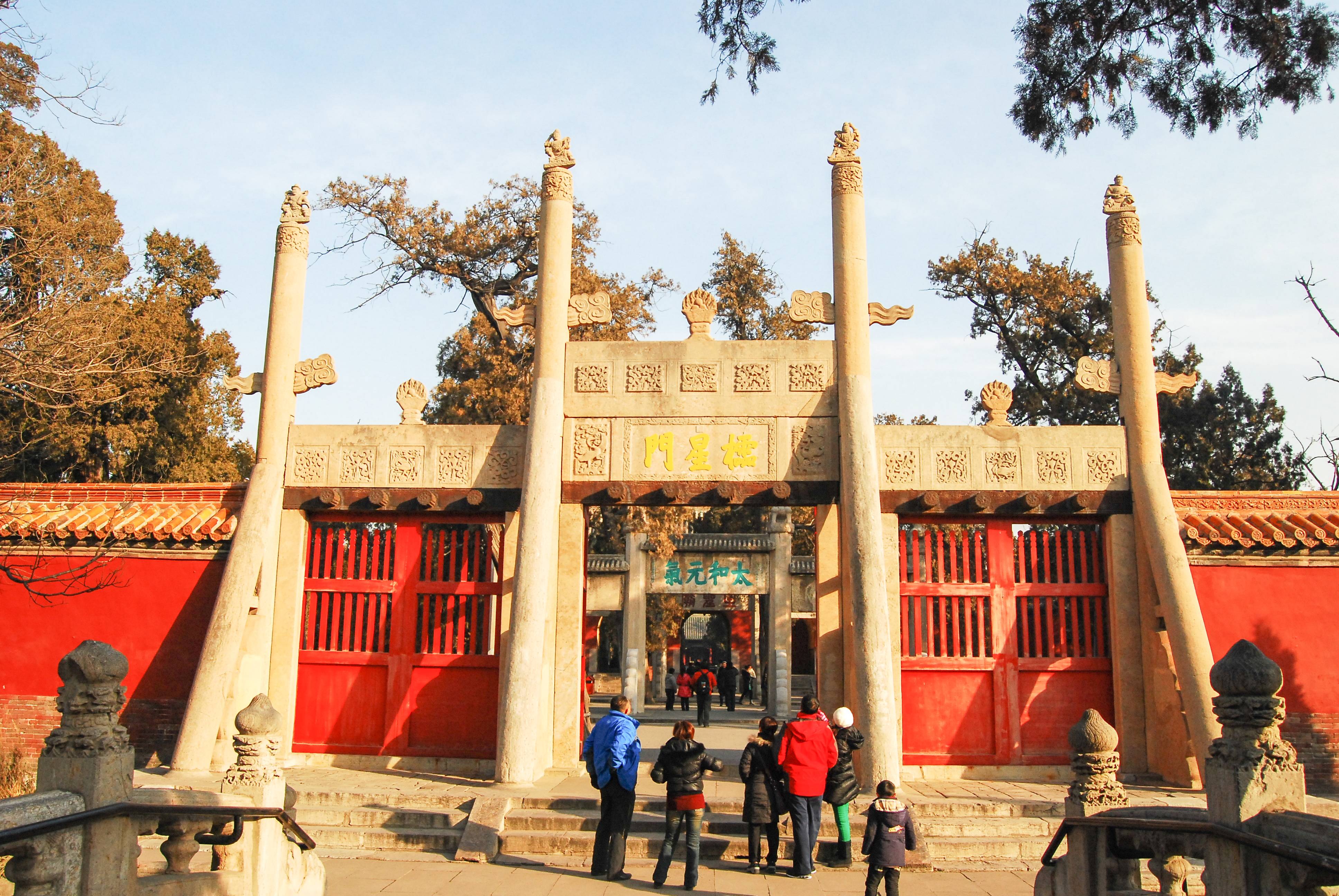 中文（中国大陆）: 曲阜孔庙棂星门